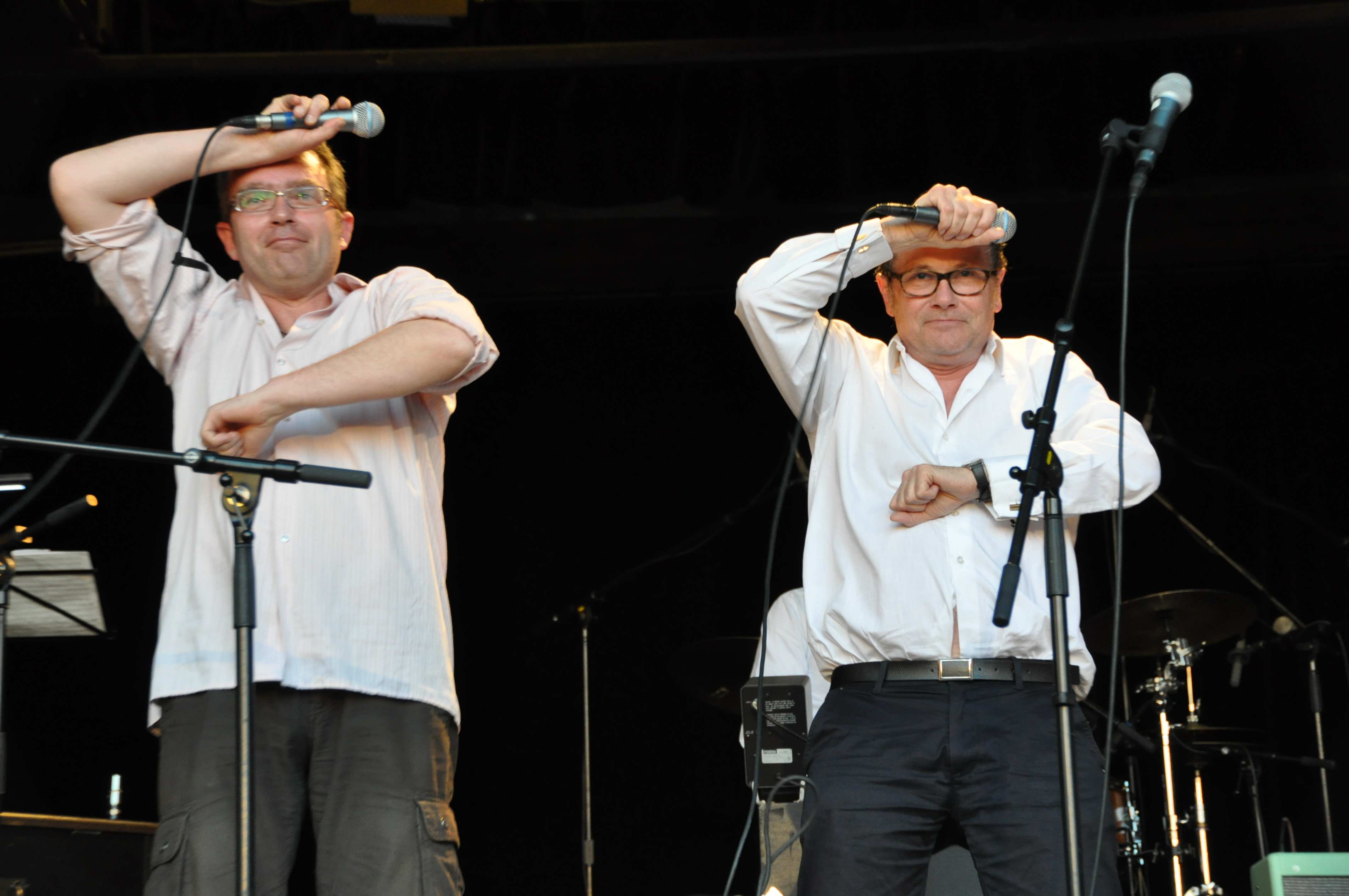 Benedikt Eichhorn (links) und Thomas Pigor am Trost und Rat Sommerfest auf der Tschauner-Bühne in Wien